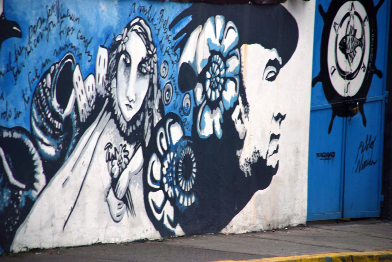 Mural del poeta chileno Pablo Neruda.